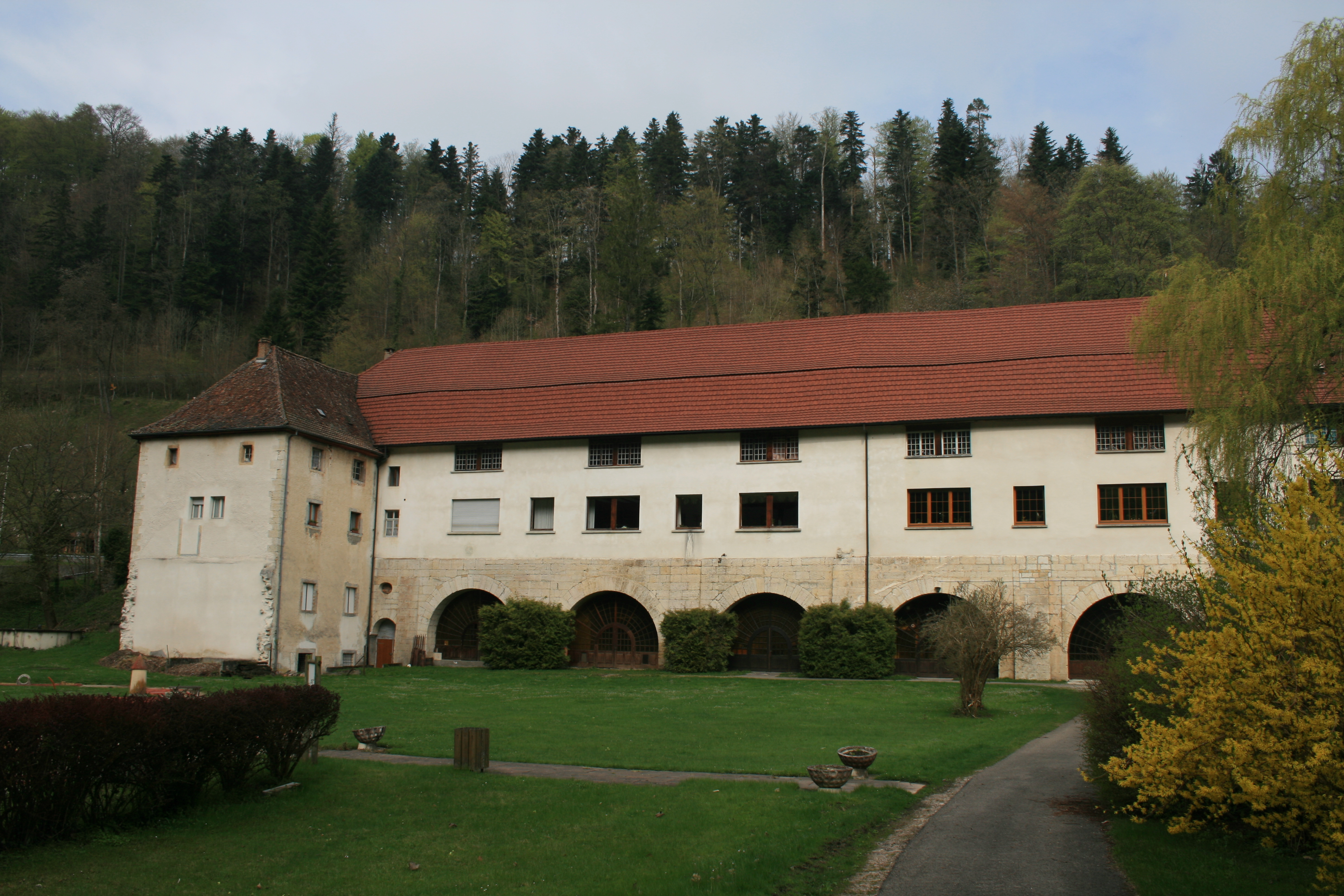 Caveau, Lucelle, Alsace